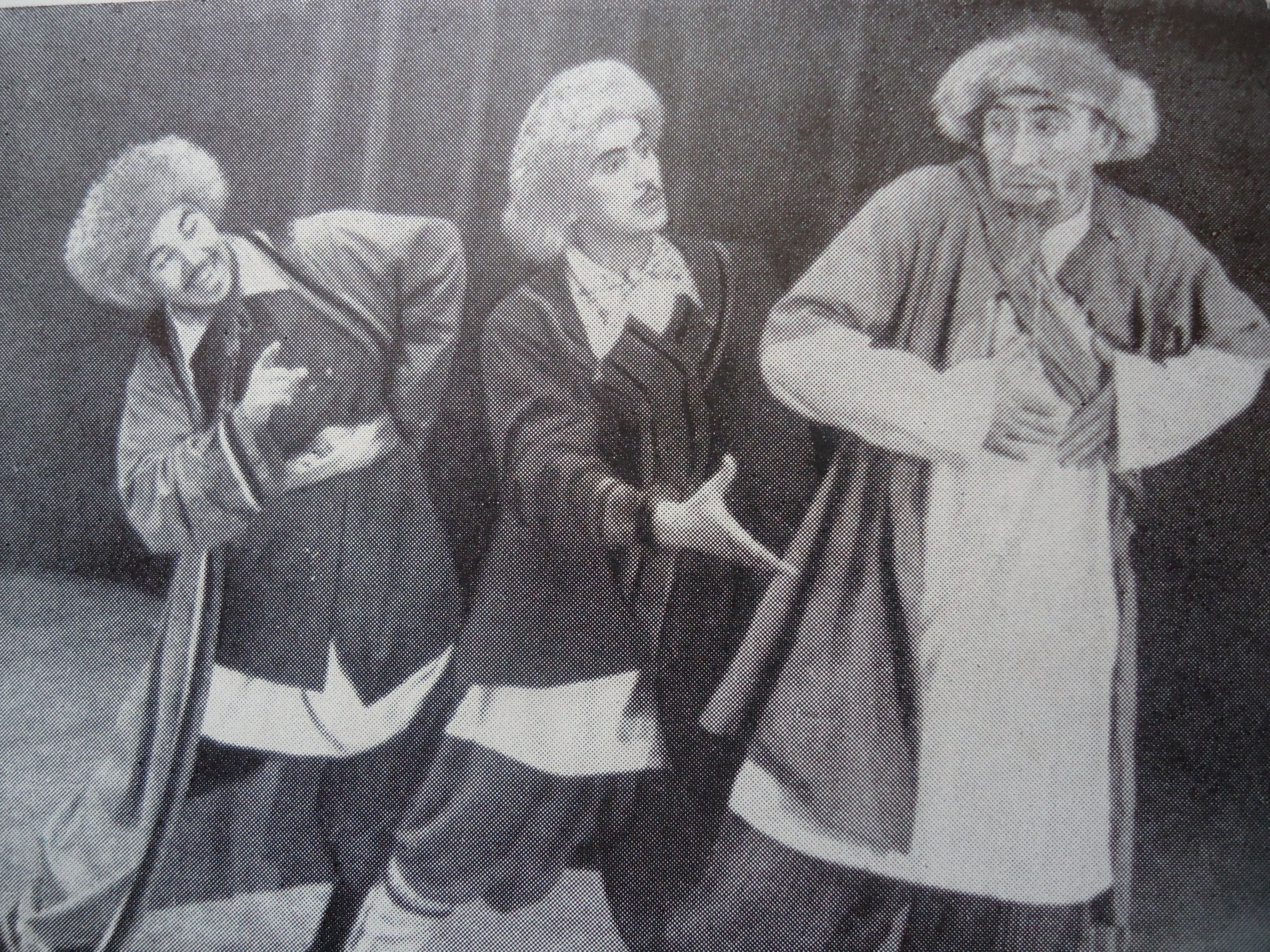 Башҡортса: "Өс таған" башҡорт шаян бейеүе. Һулдан беренсе - Мөхәммәт Иҙрисов.